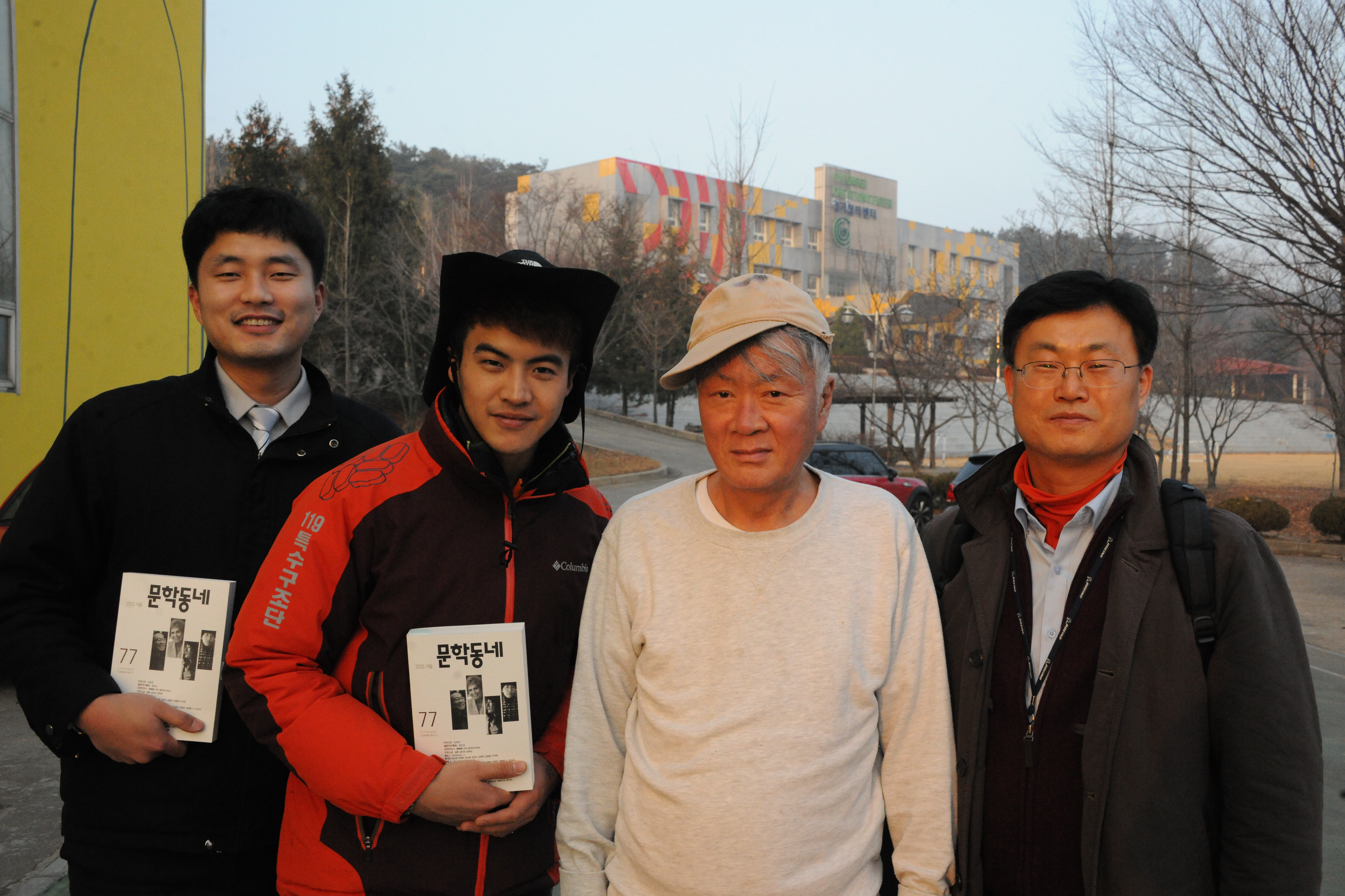 2013년 12월 4일 명예소방관 위촉 관련 소설가 김훈이 서울특별시 소방공무원 황영호, 오영환, 김명호과 만났다.